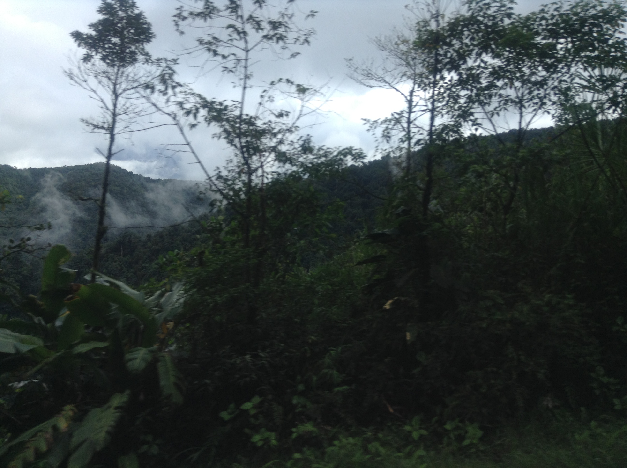 Dulce Nombre de Jesús, San José, Vázquez de Coronado, Costa Rica